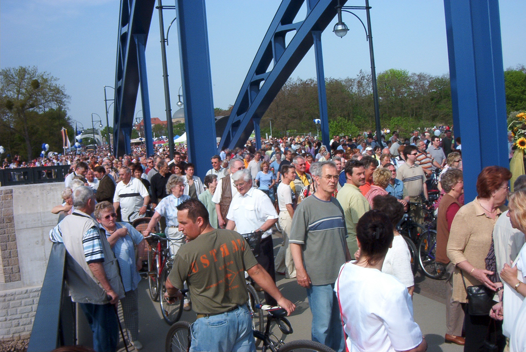 Menschenansammlung auf der Sternbrücke in Magdeburg bei der Eröffnung der Brücke am 1.5.2005, selbst aufgenommen, erteilte Lizenz: GNU-FDL